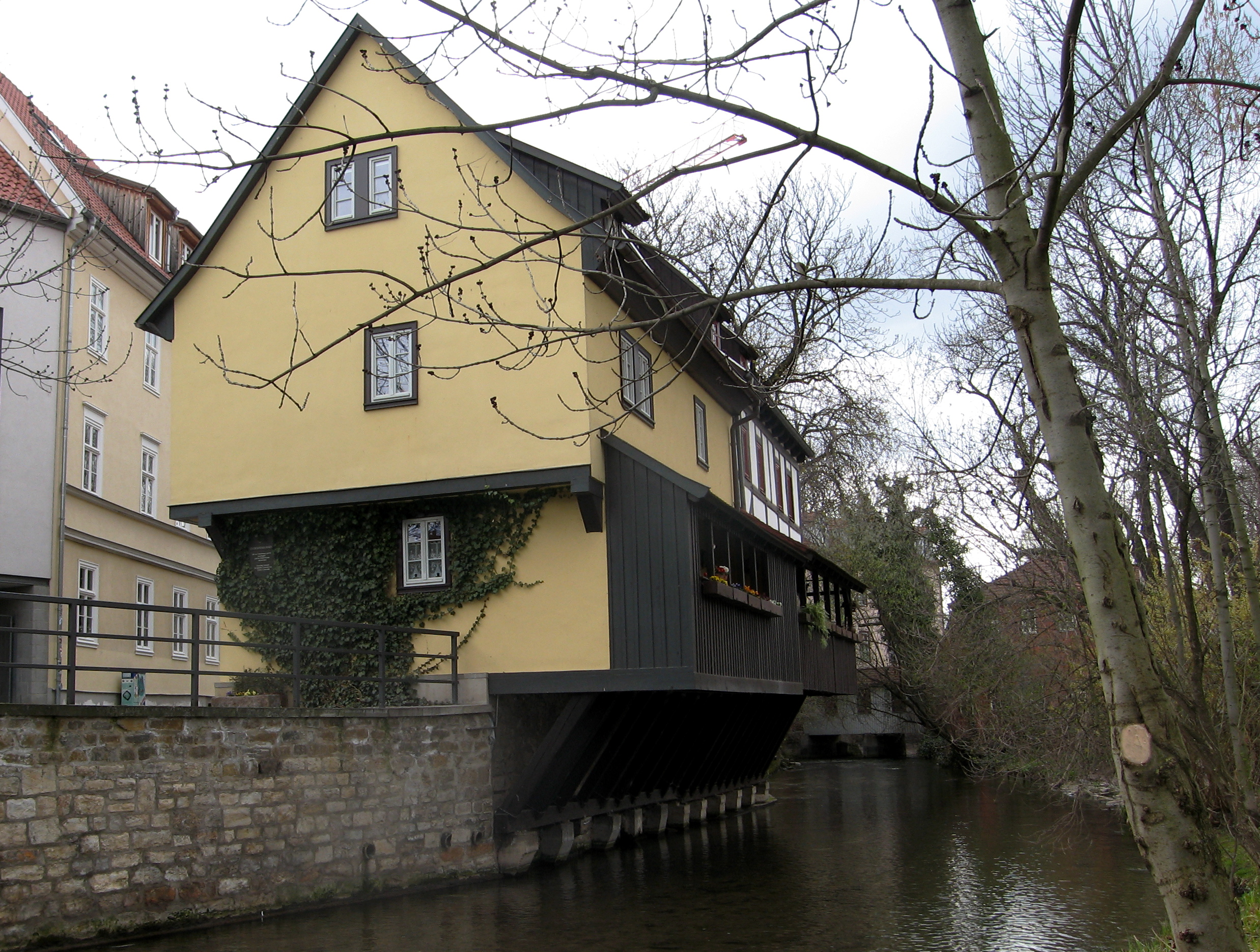 Studentenwohnheim (Burse) der alten Universität Erfurt am Flusslauf Gera